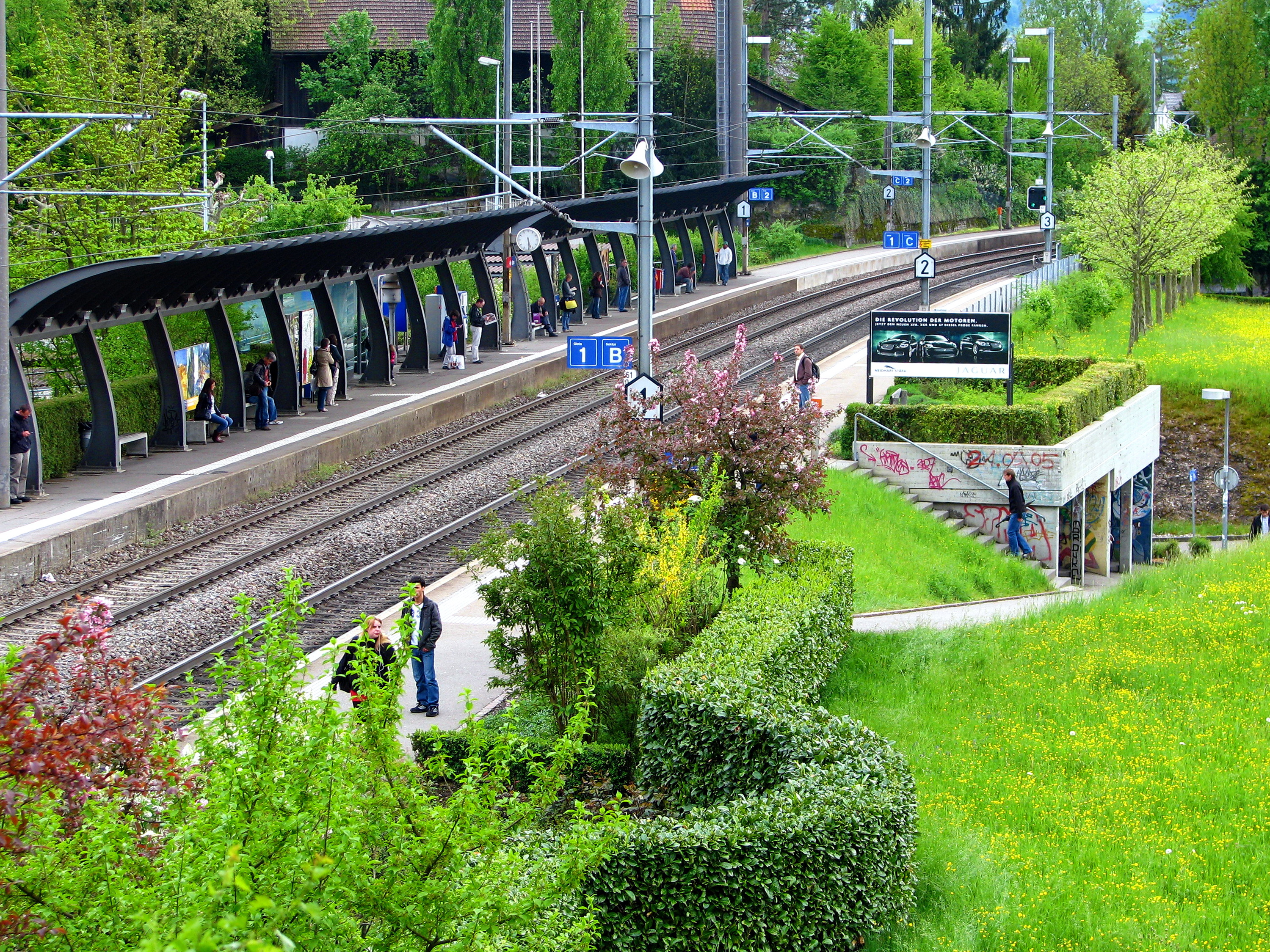 S-Bahn Zürich train station in Jona (SG)